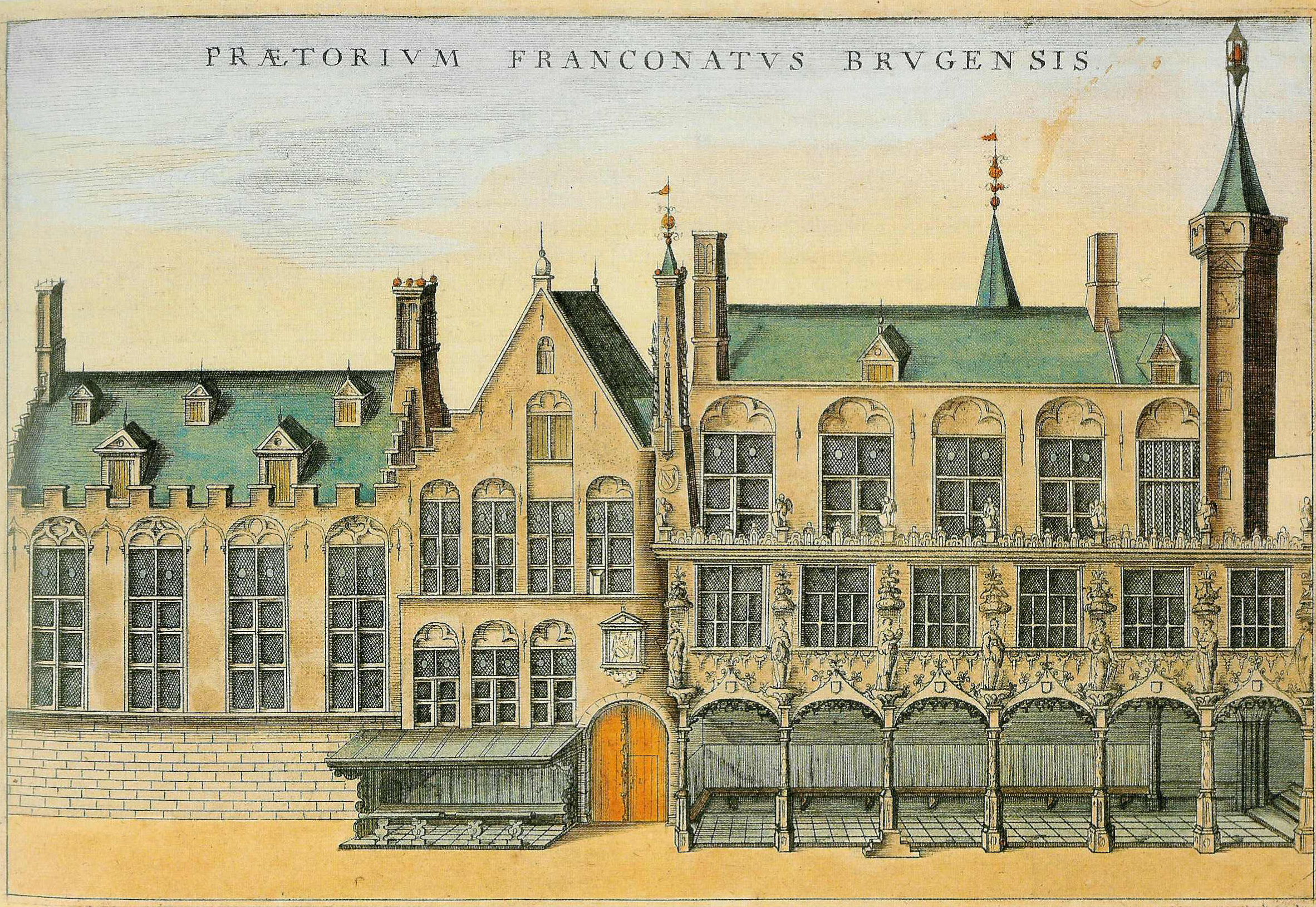 Het Landhuis van Het Brugse Vrije op de Burg te Brugge (België). Gebouwd in 1440, de galerij rechts in Gotische stijl werd gebouwd in 1532. In 1722 kwam op die plaats het gerechtshof, thans voormalig gerechtshof.